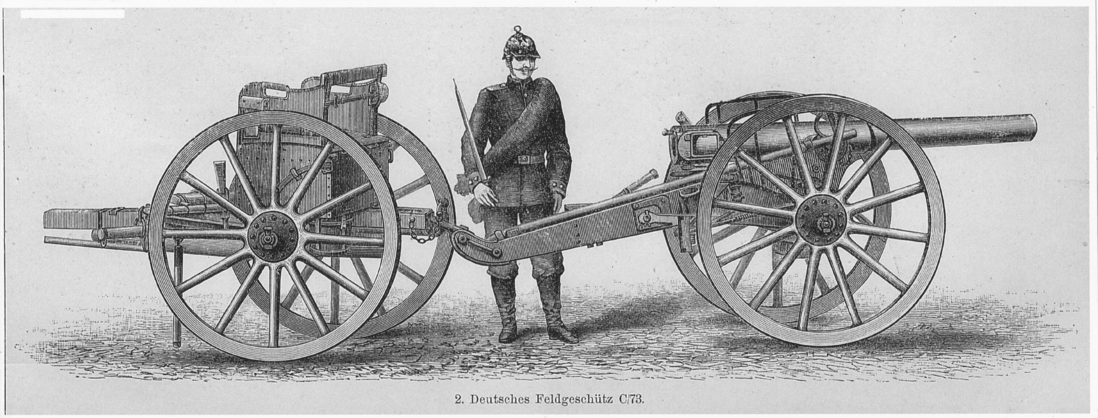 Preußische Feldkanone C73